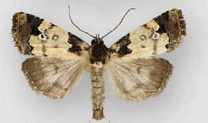 Bryolymnia marti male